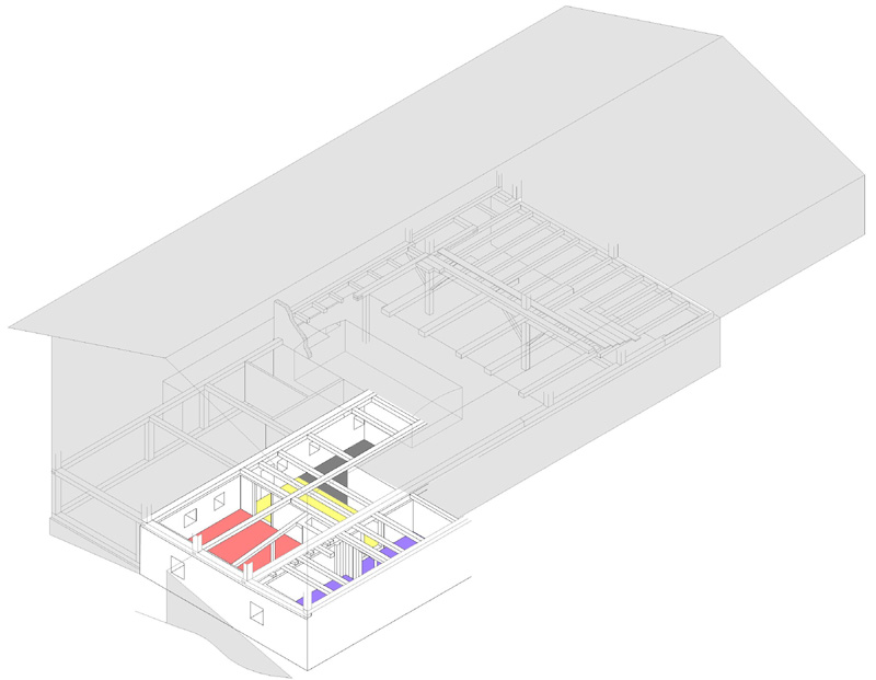 Bauernhaus "Villa Goldonkel" in Pfronten, Isometrie des Kellergeschosses